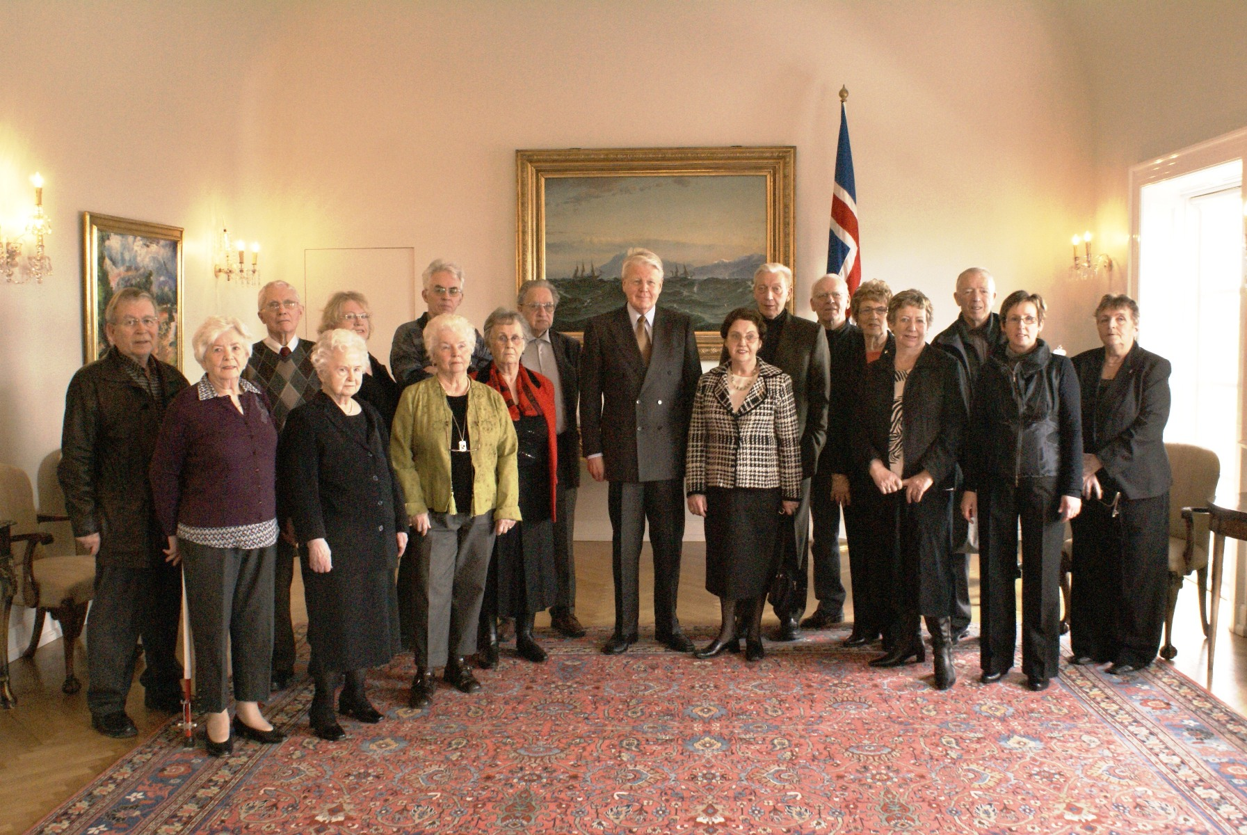 Félag eldriborgara Álftanes (Senior Citisens Association Álftanes) Heimsókn FEBA til forseta íslands Ólafs Ragnars Grímssonar 3. mars 2009